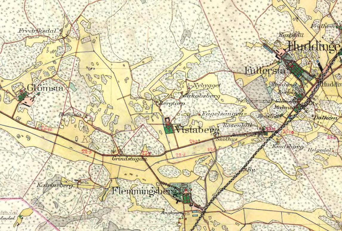 Gårdarna Fullersta, Flemmingsberg, Vistaberg, Glömsta i Huddinge socken